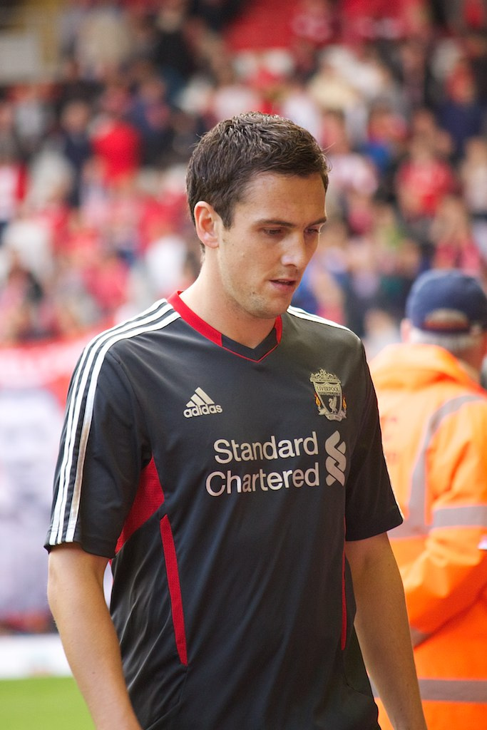 Liverpool vs Bolton 27/08/2011